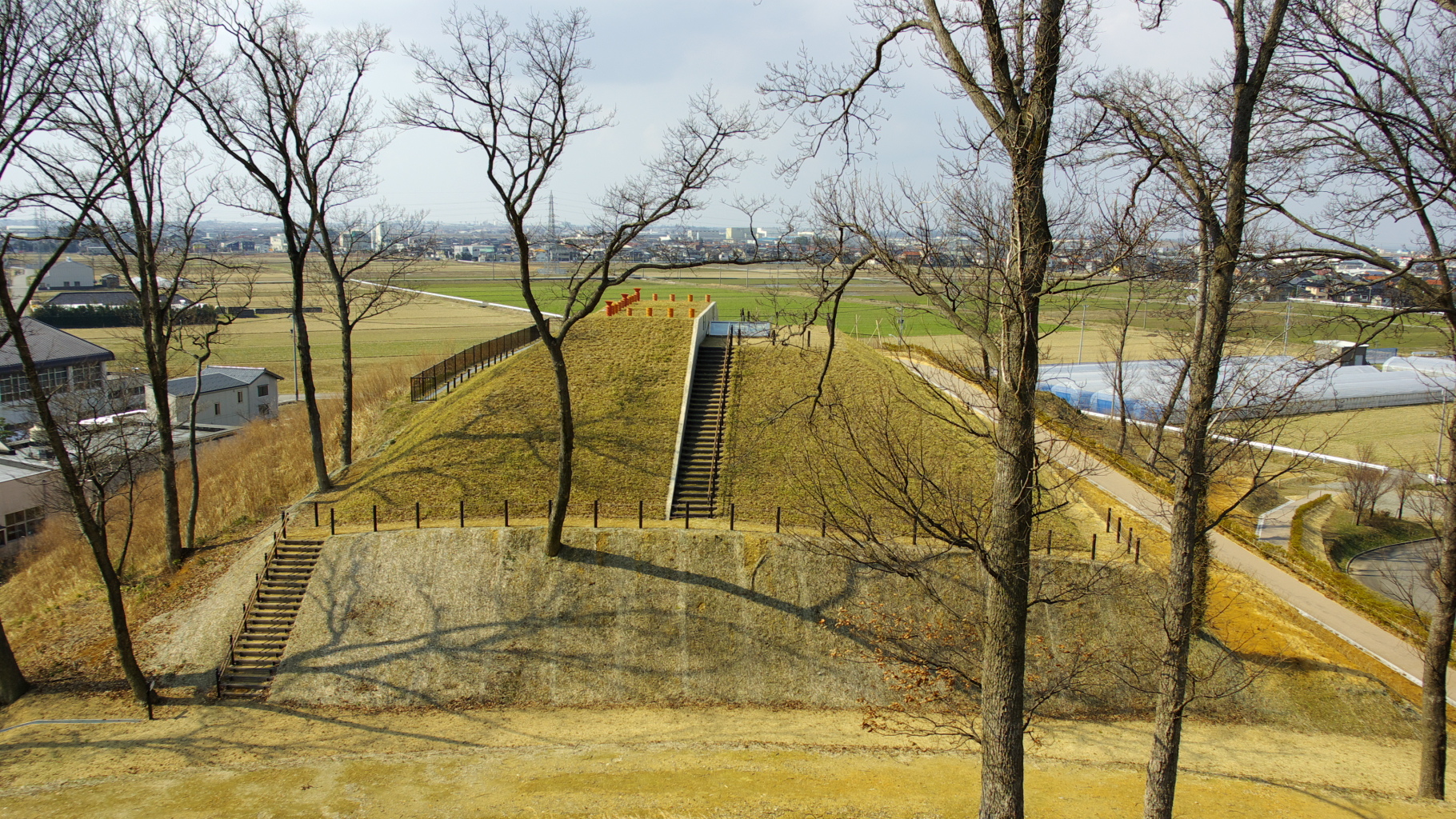 秋常山1号墳から見た秋常山2号墳。石川県能美市。